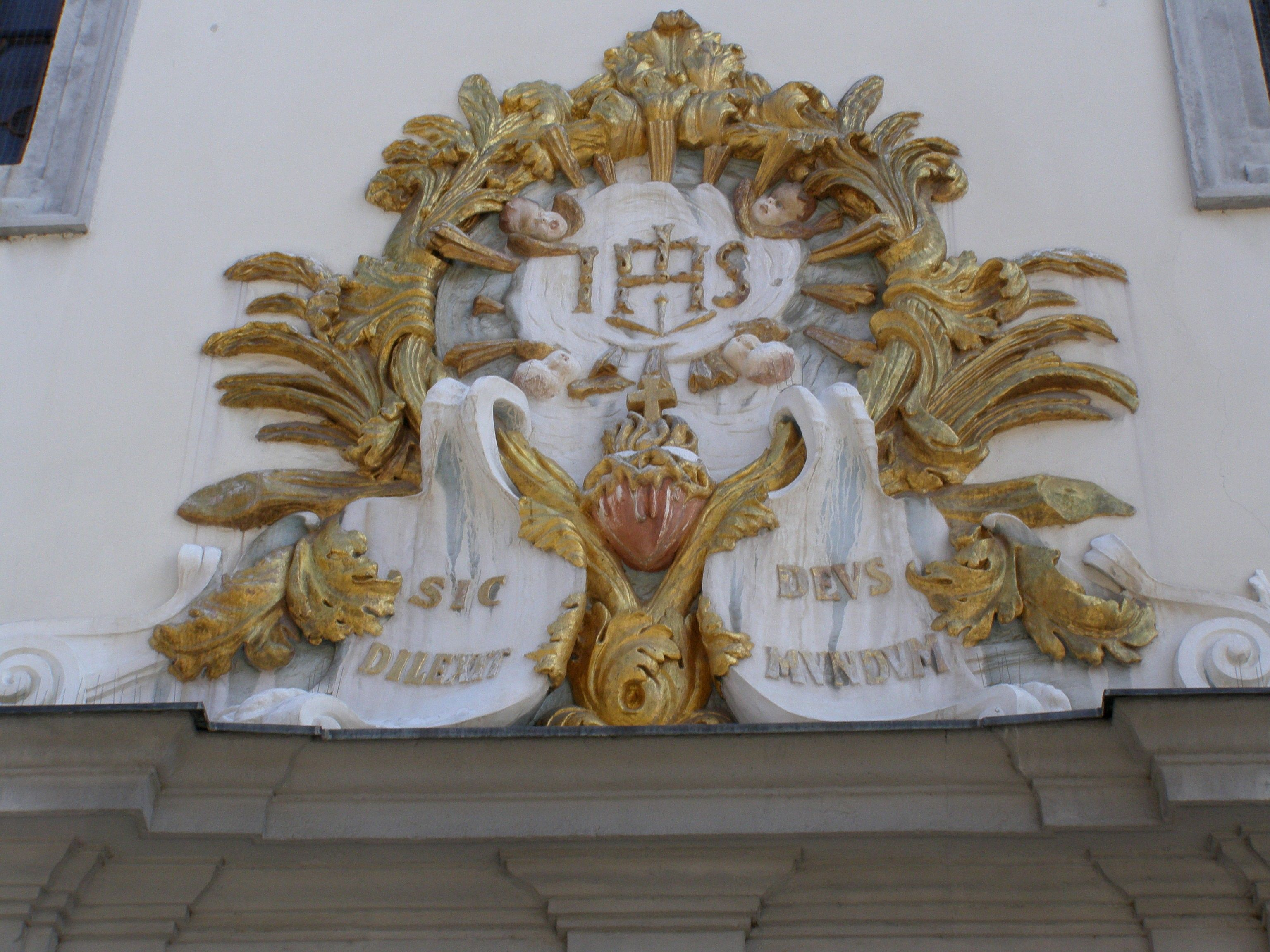 Reliéfny erb jezuitskej rehole nad hlavným portálom